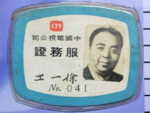 1970年代中國電視公司服務證。